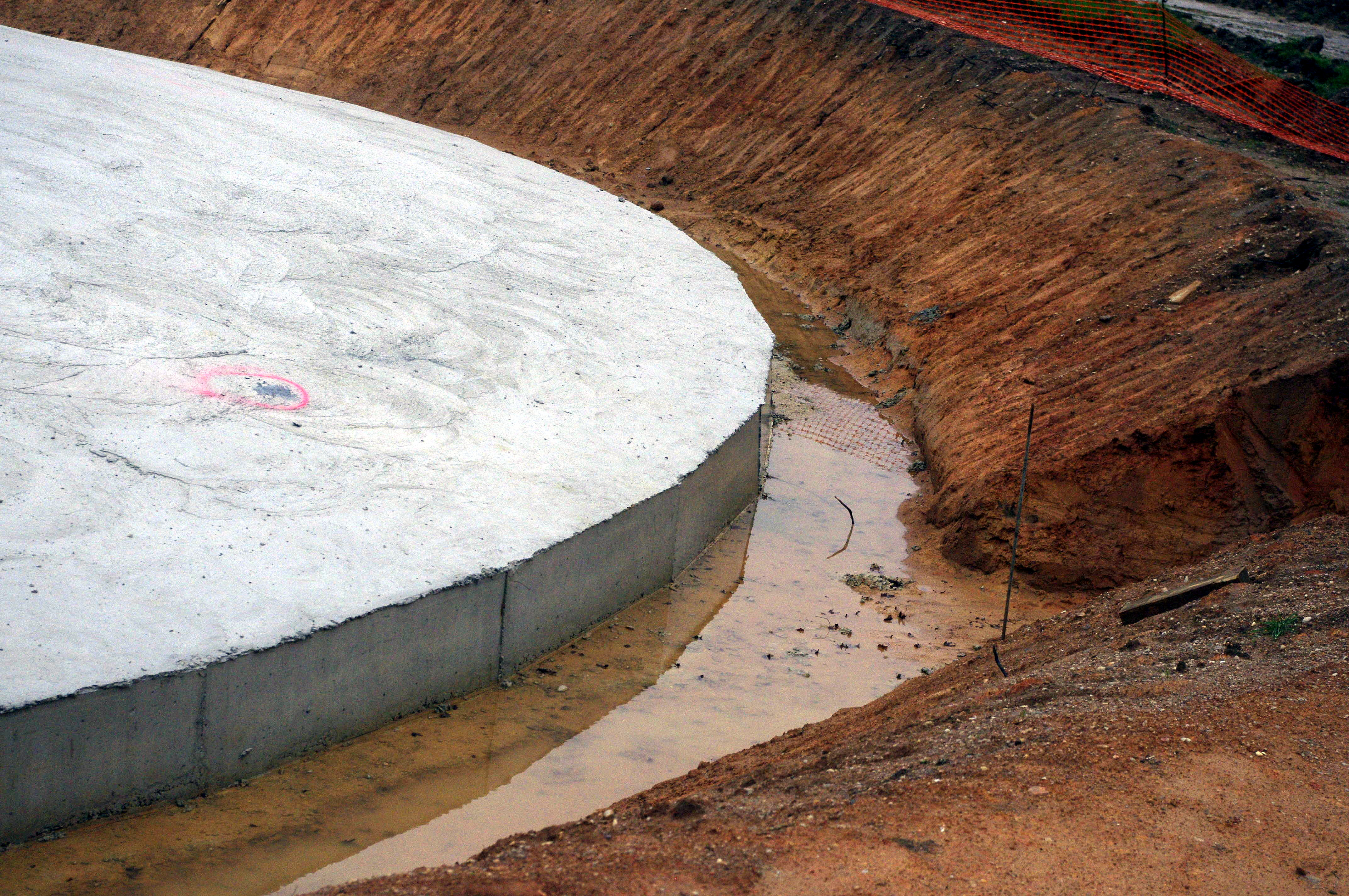 Parc éolien à Maisonnais-sur-Tardoire, Haute-Vienne, Chantier éolienne 1